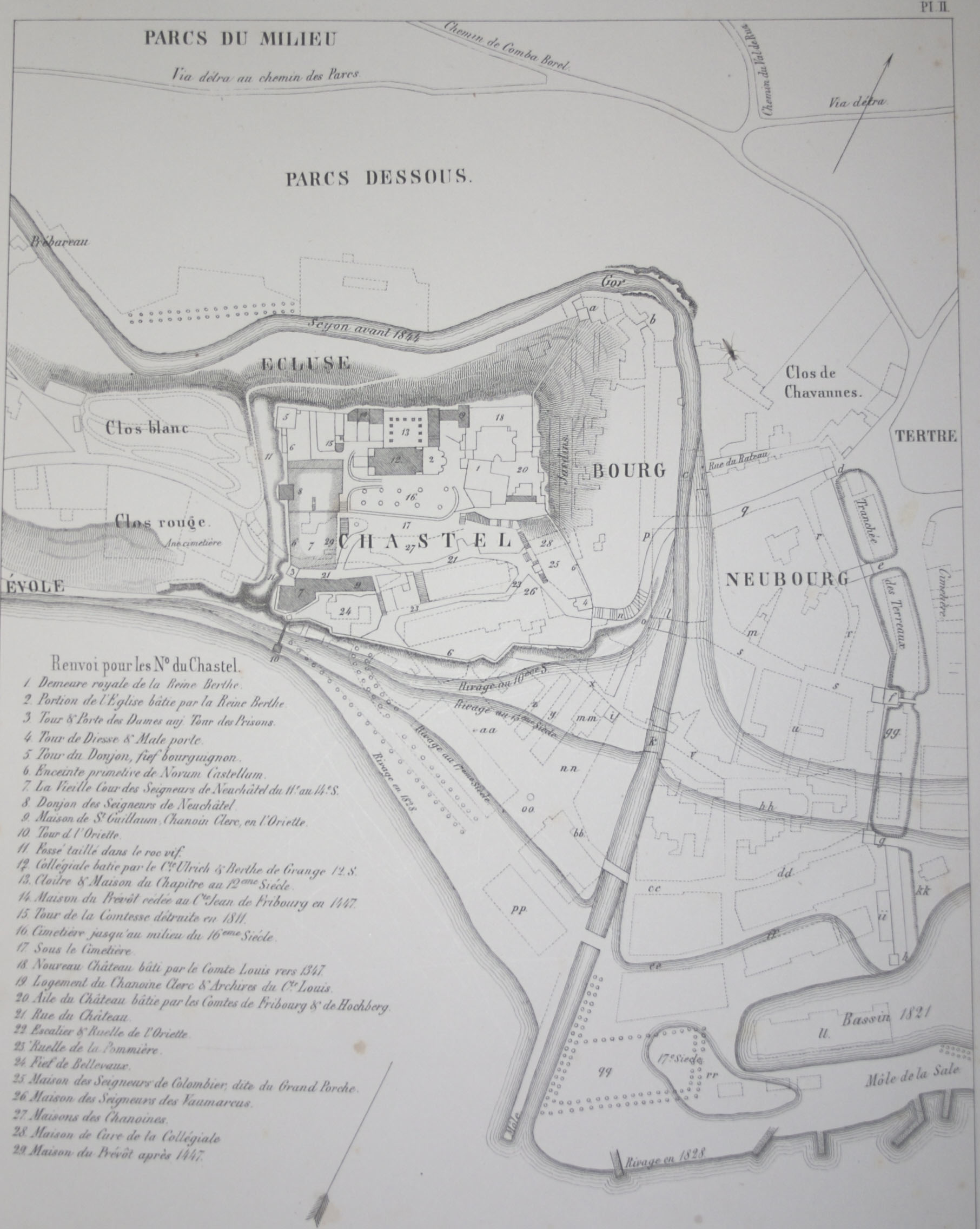 Plan du chateau de neuchatel